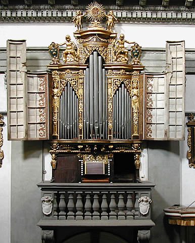 foto